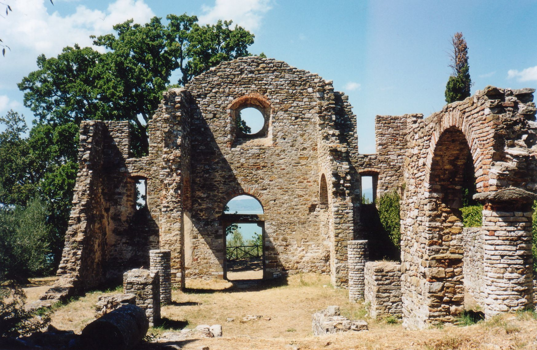 Ruine San Secondo, Isola Polvese